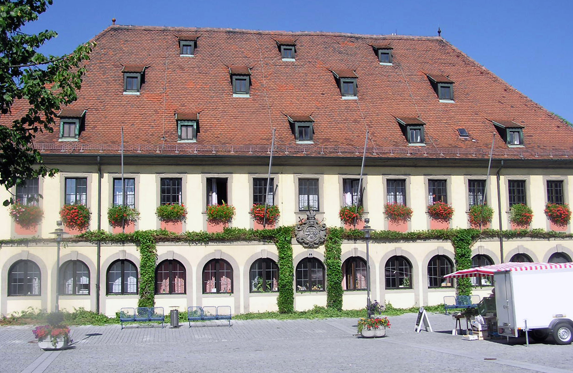 Rathaus Lichtenfels